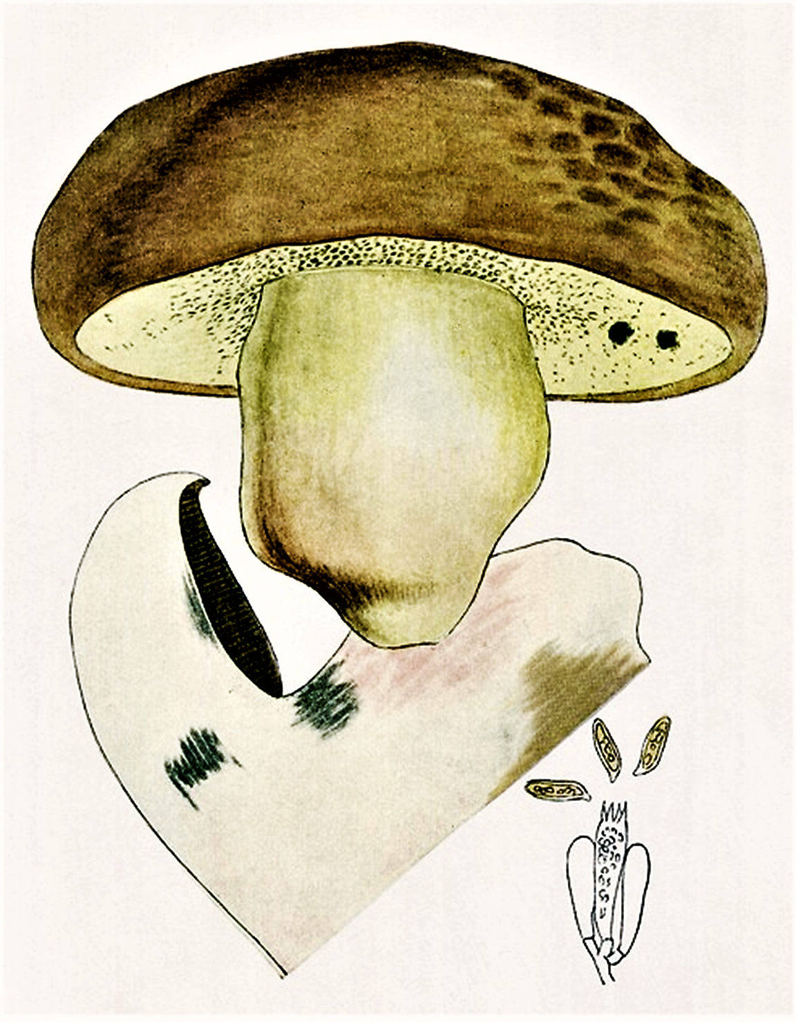 Giacomo Bresadola: Boletus fragrans Vittad. (1835), heute auch Lanmaoa fragrans (Vittad.) Vizzini, Gelardi & Simonini (2015)